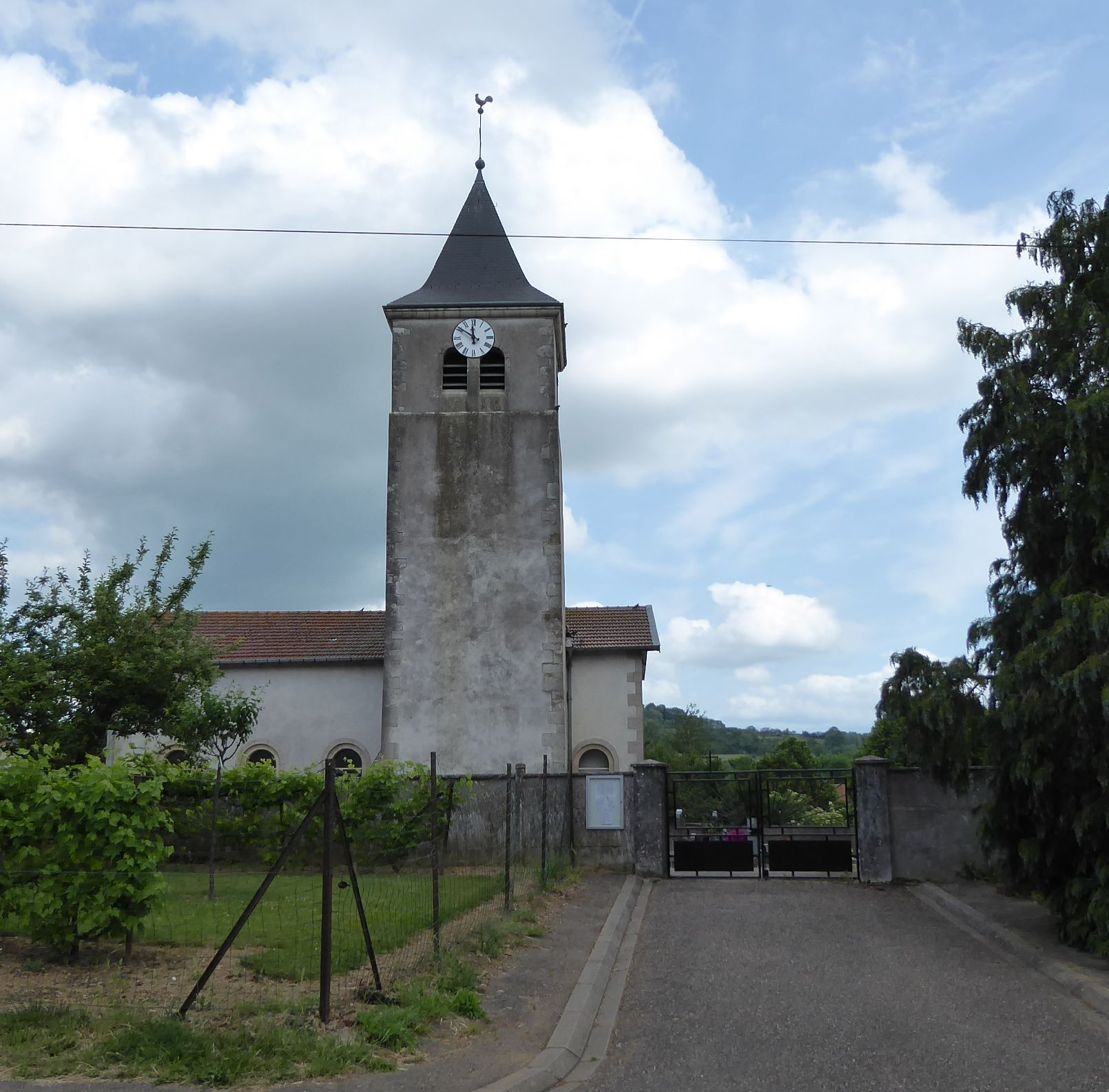 Église de Sivry en Meurthe-et-Moselle (France).